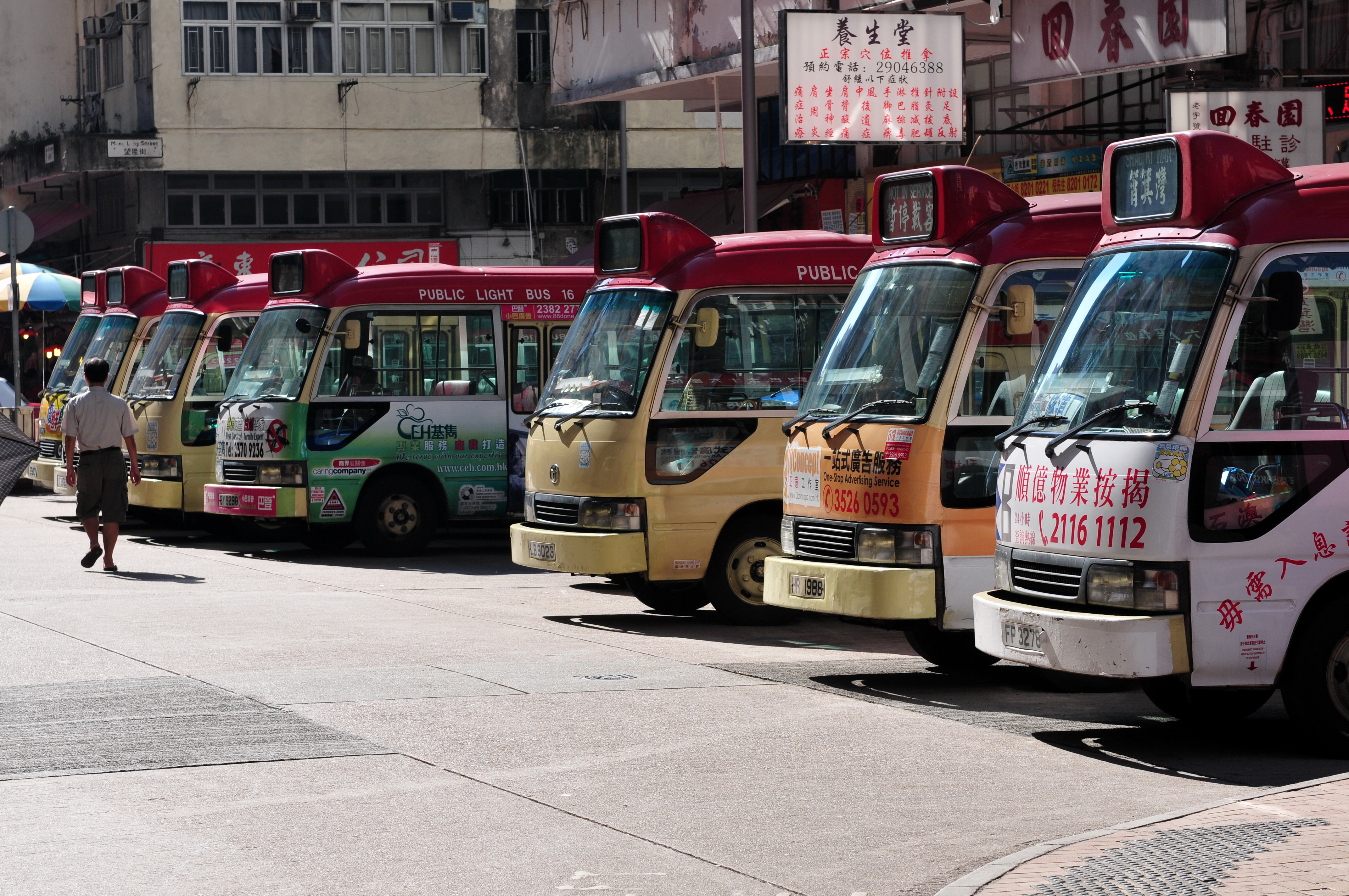 Minibusses in Hong Kong. Wikimania 2013 Hongkong